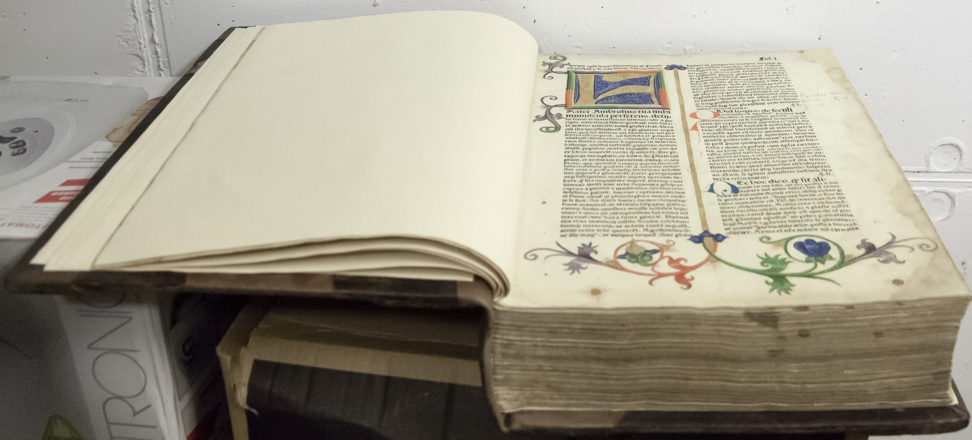 Die Koberger Bibel von 1483 ist das älteste Buch der Auricher Landschaftsbibliothek und stammt aus der Sammlung des ersten preußischen Regierungspräsidenten Christoph Friedrich von Derschau.